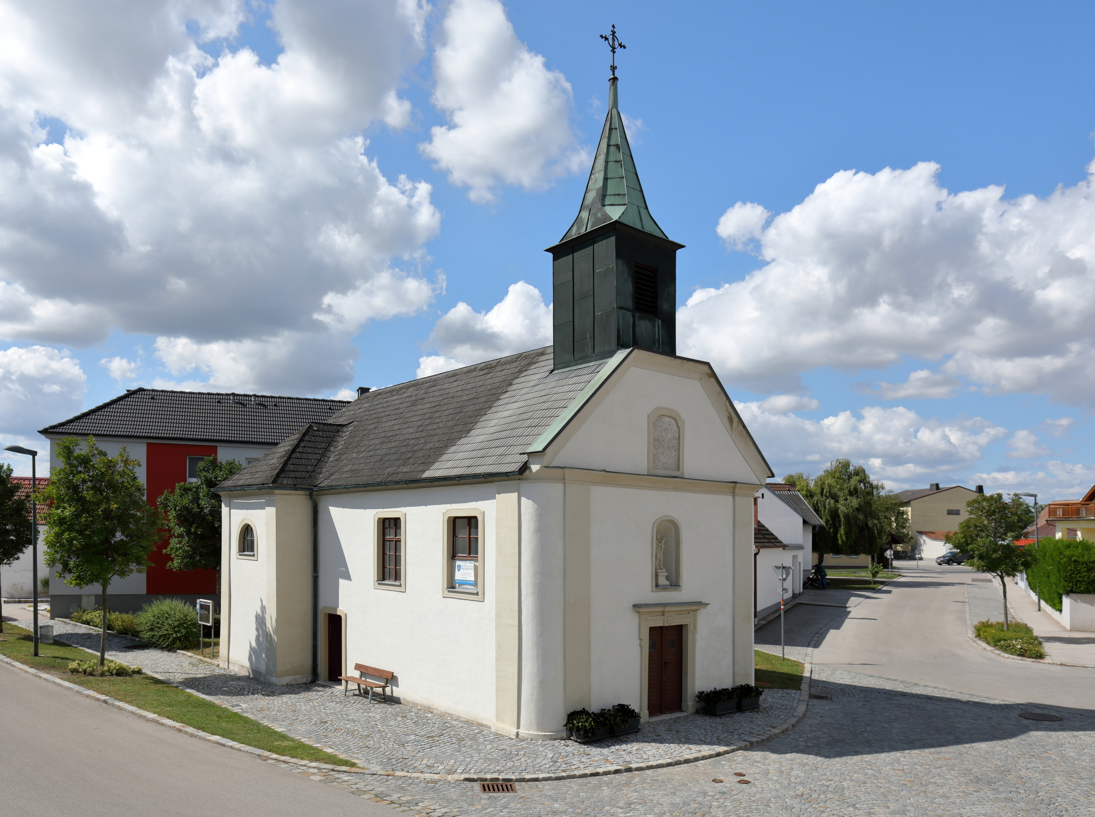 Die Antonikapelle in der burgenländischen Marktgemeinde Großhöflein. Der kleine Barockbau mit Querschiff, einer flach geschlossenen Apsis mit abgeschrägten Ecken und einem Dachreiter mit Spitzhelm wurde von der Fürstin Maria Octavia Esterházy 1730 gestiftet und 1767 geweiht.